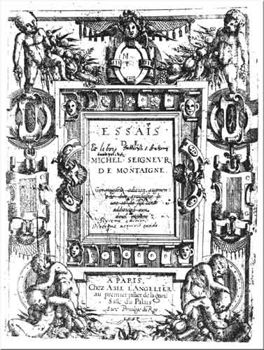 Frontpage of Essays_(Montaigne)